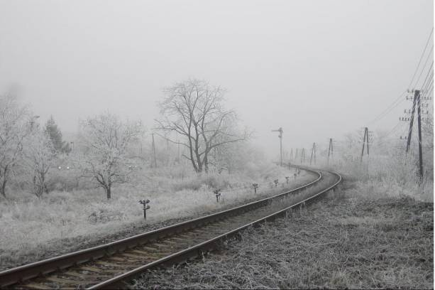 Pohľad na zamrznutú železnicu za Komjaticami